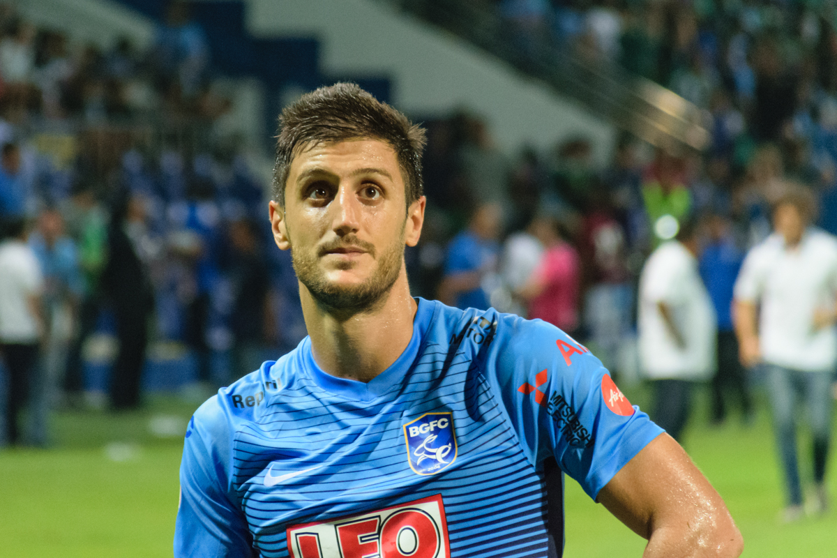 Daniel García Rodríguez aka Toti